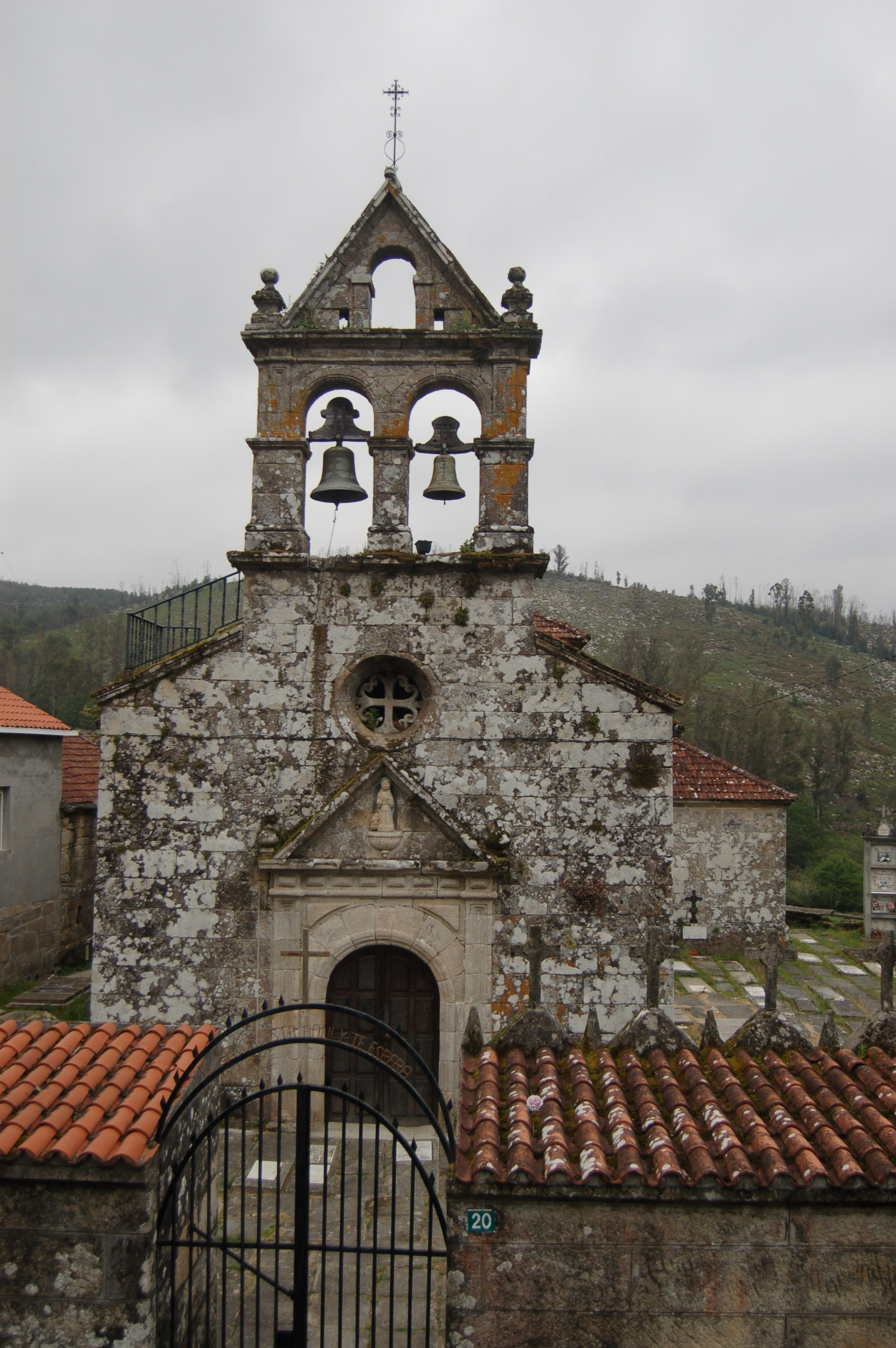 Igrexa de santo Isidro en Montes, Campo Lameiro